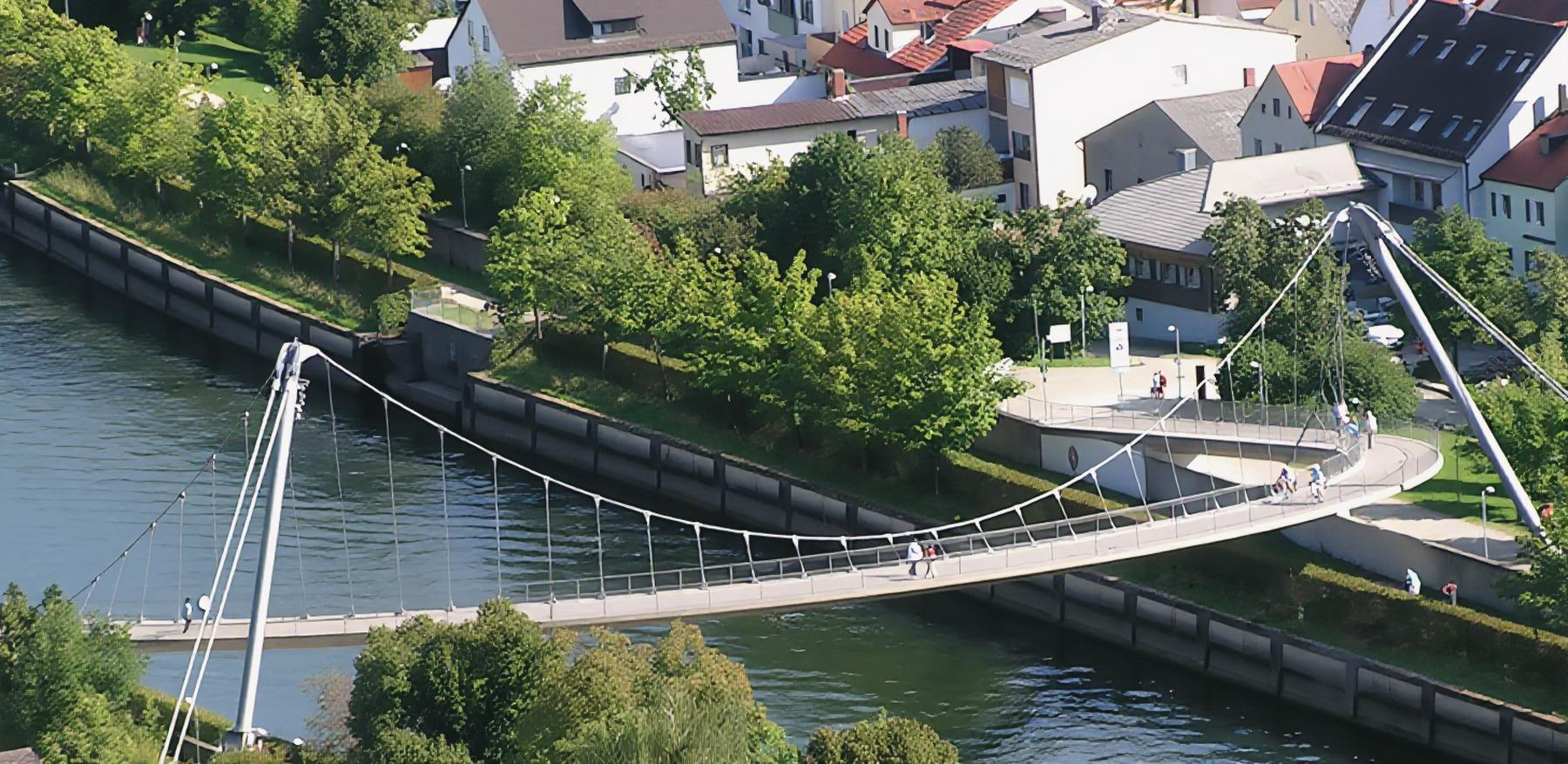 Rhein-Main-Donau-Kanal: Fußgängerbrücke Kelheim